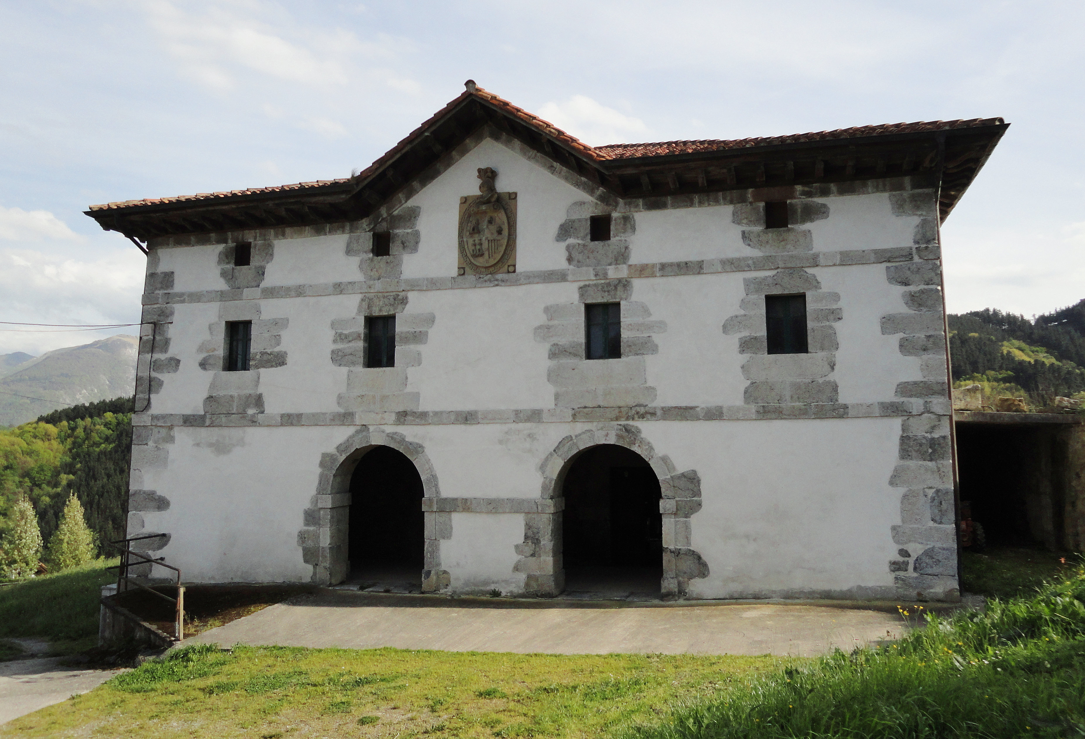 Baliarraingo Lopetegi oinetxea